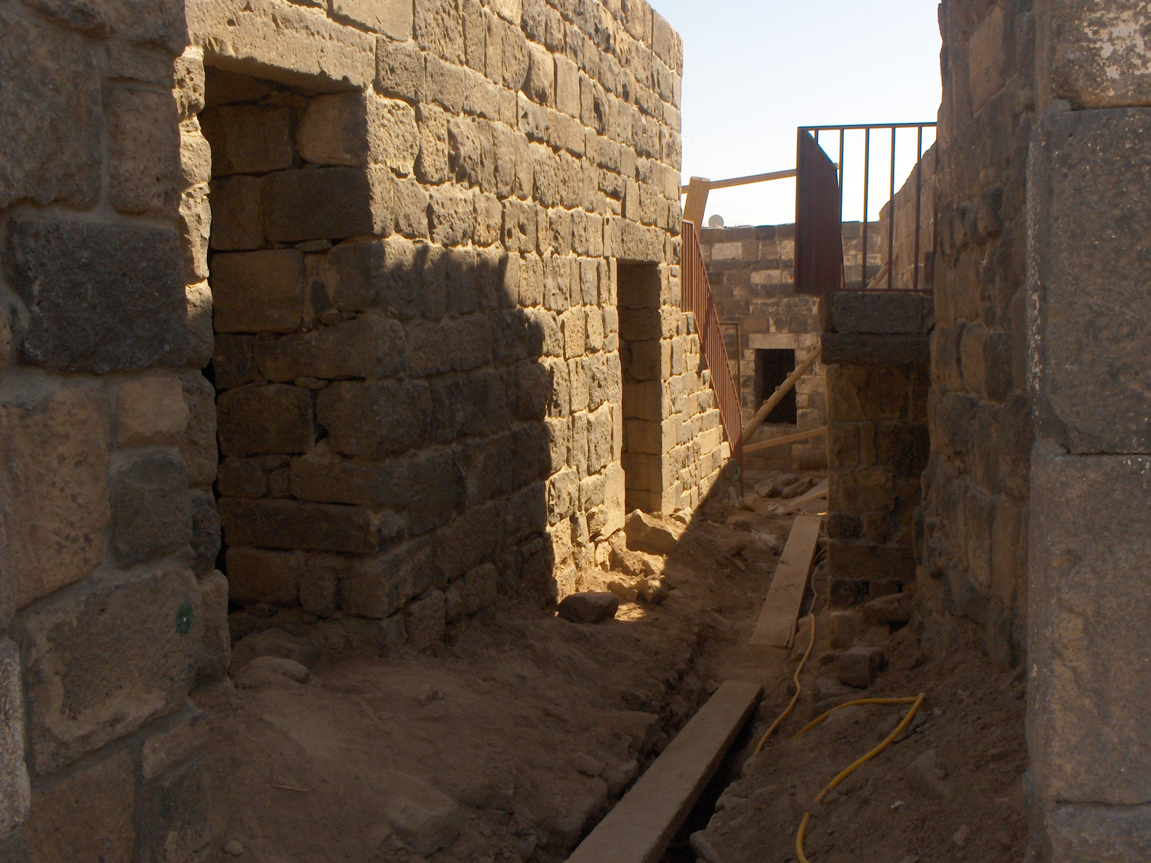 Una via di Bosra, Siria